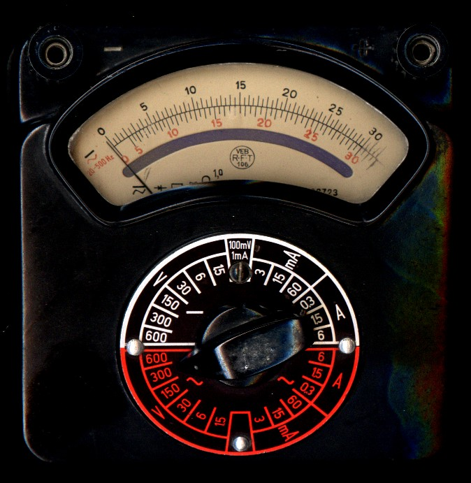 Messgerät Multizet